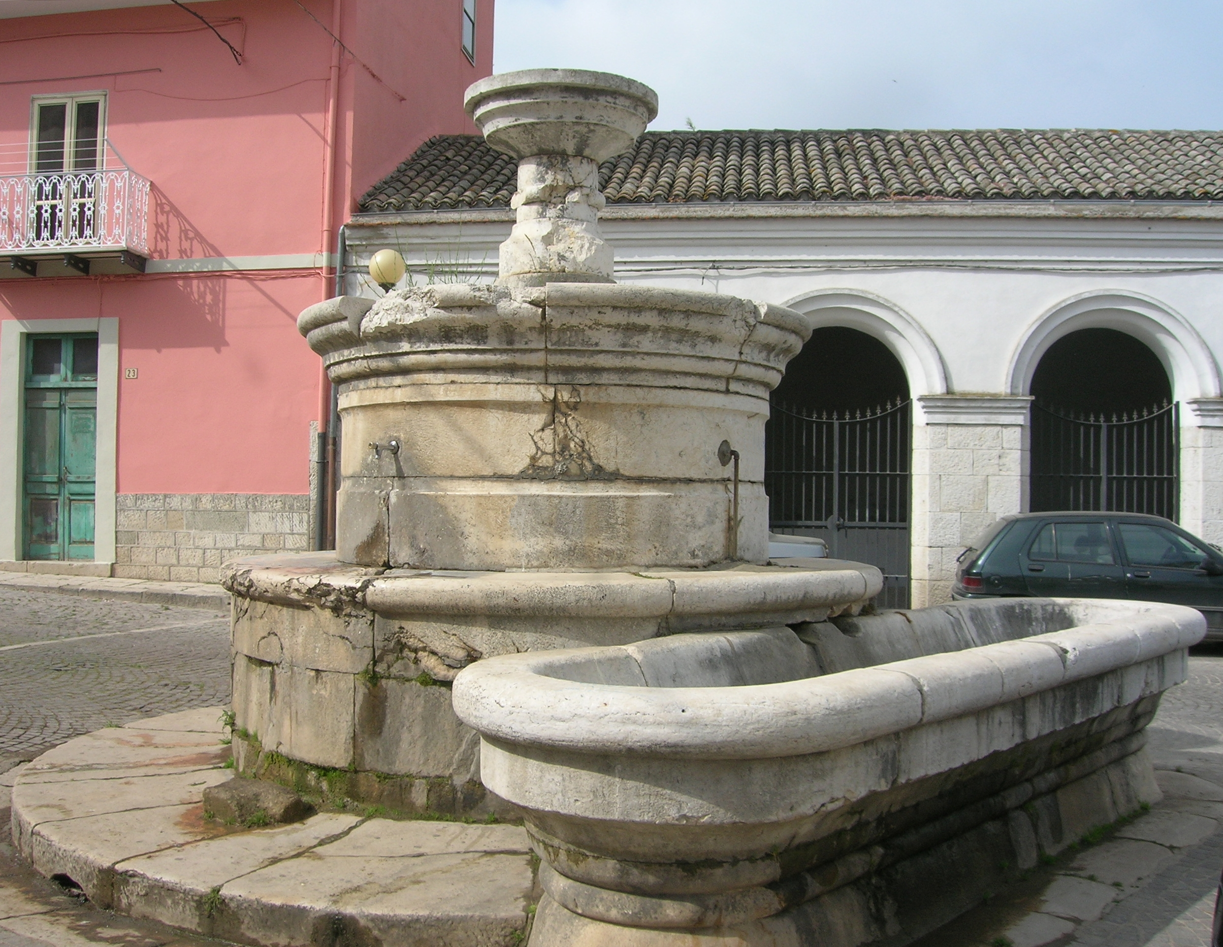 Fontana di San Marco, Venosa, Italia.